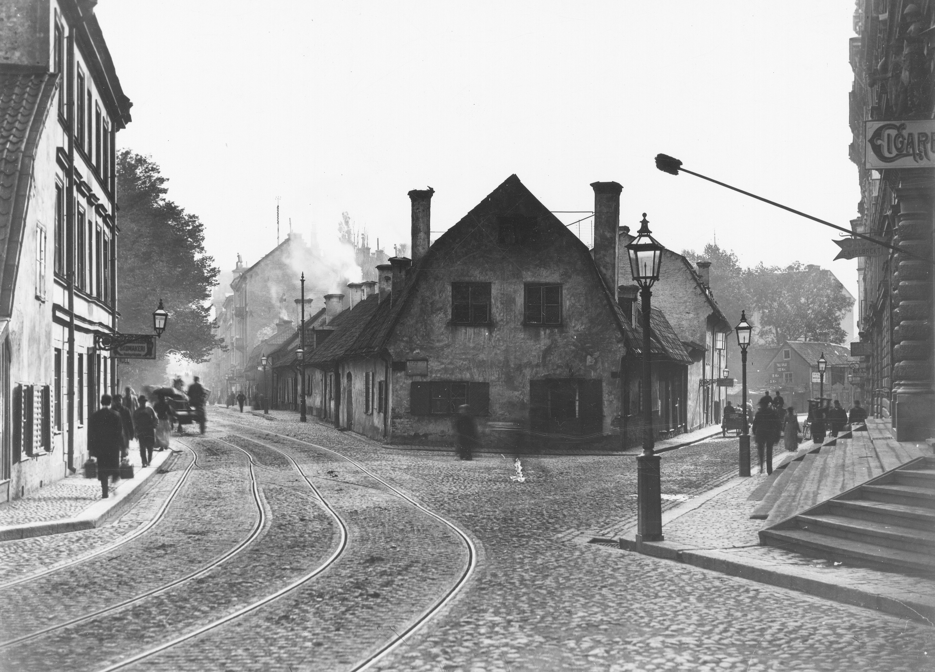 Bebyggelsen på nuvarande kvarteret Landbyska verket vid nuvarande Engelbrektsplan, vid 1800-talets början ett bryggeri ägt av Christioan Landby.